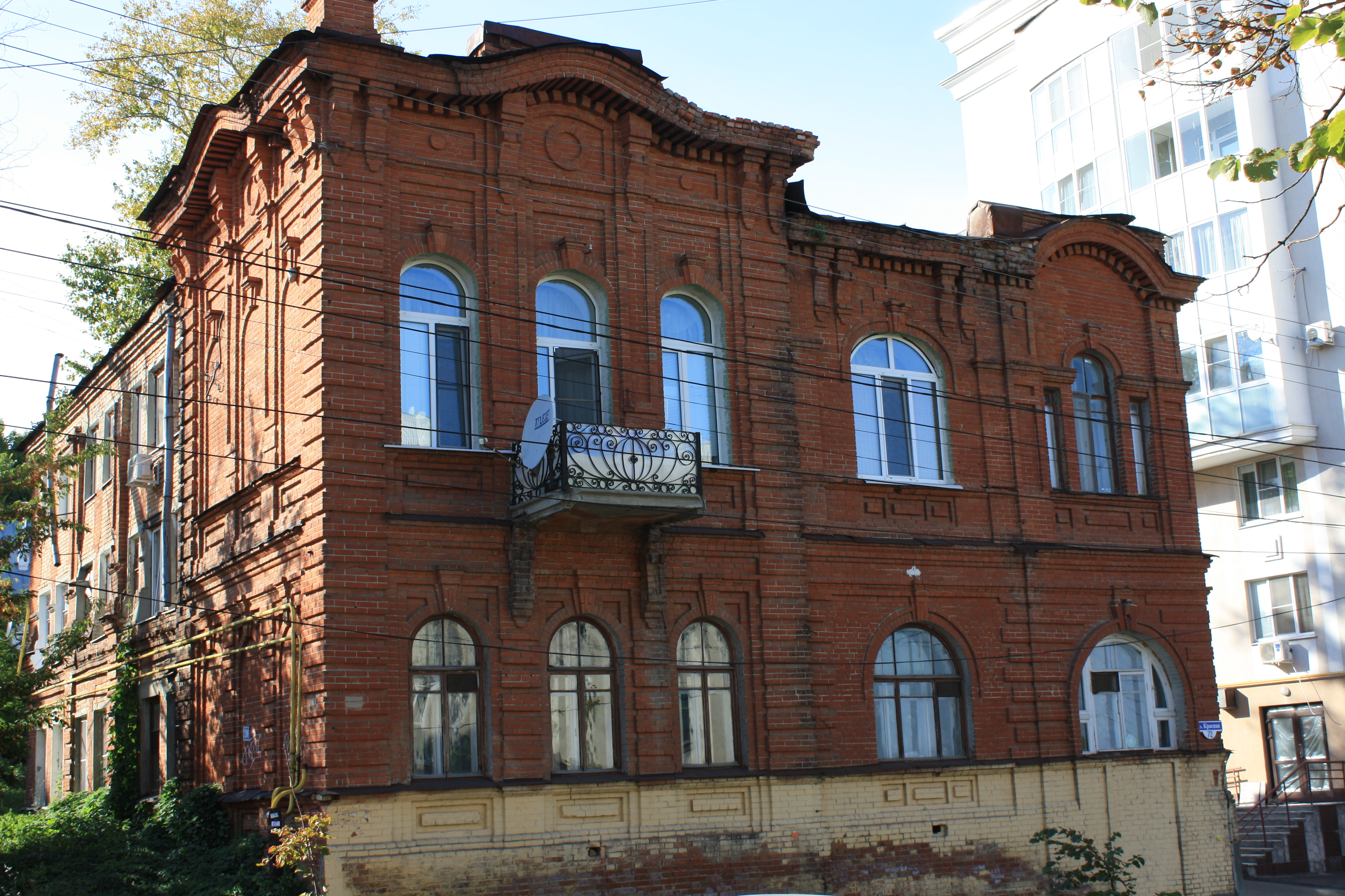 Здание, где размещалась губернская ЧК: улица Красная, 72, Пенза, Пензенская область